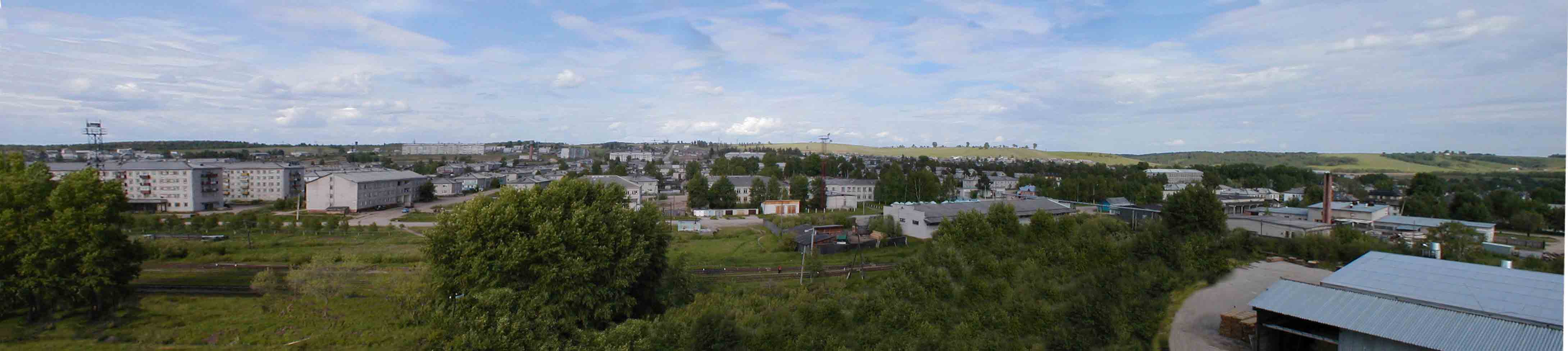 Панорама Демьяново с территории Полеко